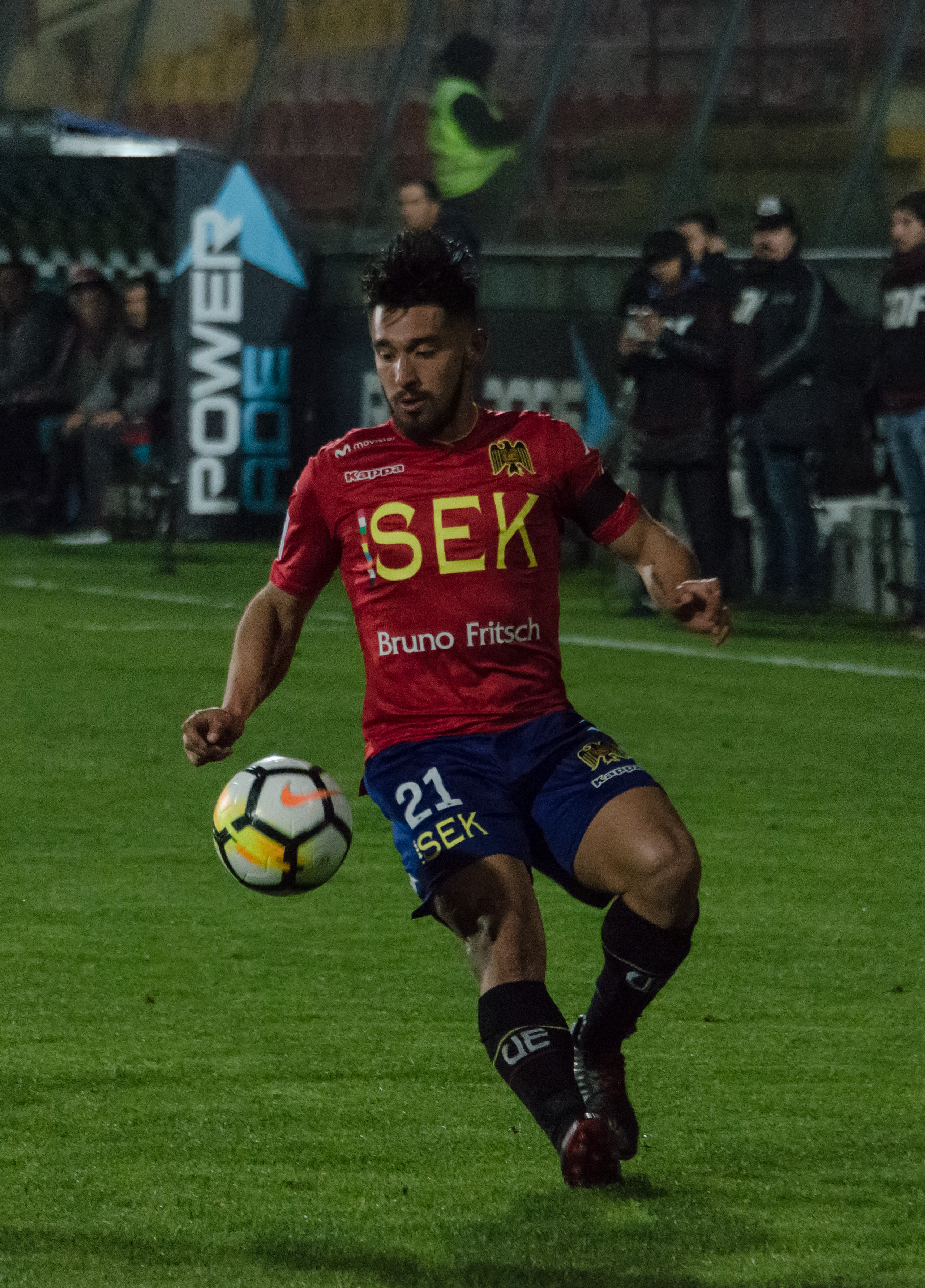 Gary Tello, Unión Española v Curicó Unido, Estadio Santa Laura, Independencia, Santiago, Chile